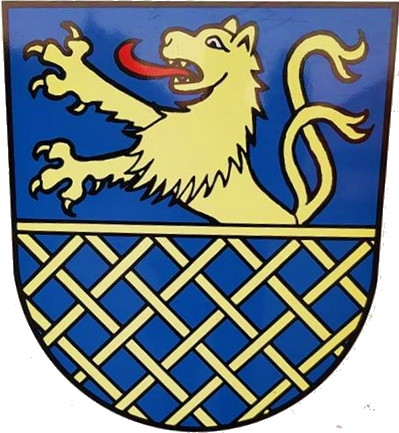 Das Hochemminger Wappen an der Rathaustür